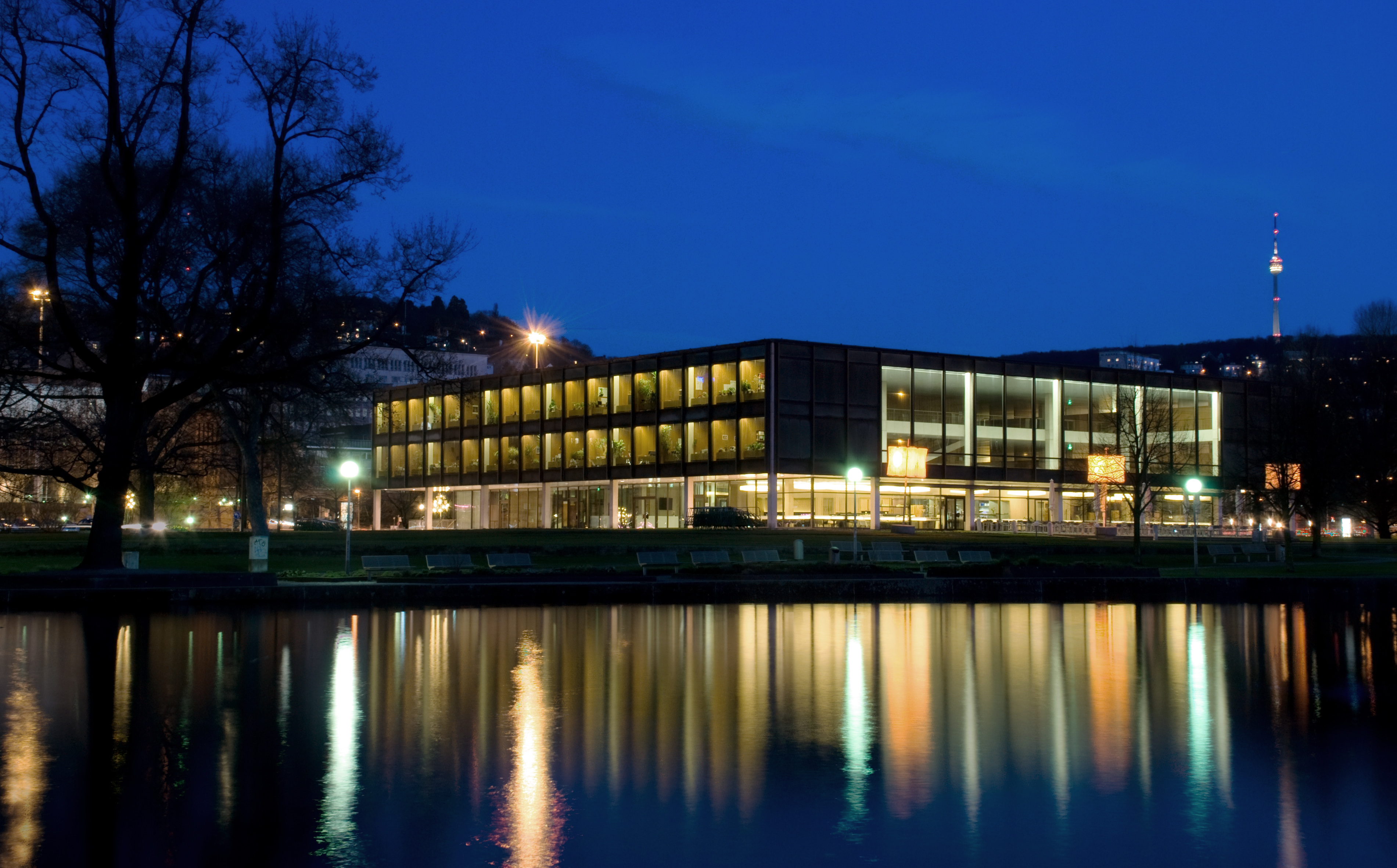 Landtag von Baden-Württemberg, Stuttgart. Architekt: Horst Linde (HDR-Bild aus drei Aufnahmen)